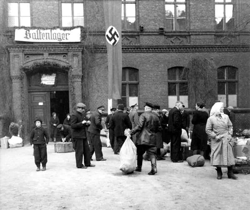 Posen, Umsiedlung, Baltenlager Posen Wartheland Balten-Umsiedlung: Baltenlager Quelle: DAI (Albrecht) 1940 [Posen.- Baltendeutsche Umsiedler mit ihrem Gepäck auf dem Hof des Baltenlagers.]